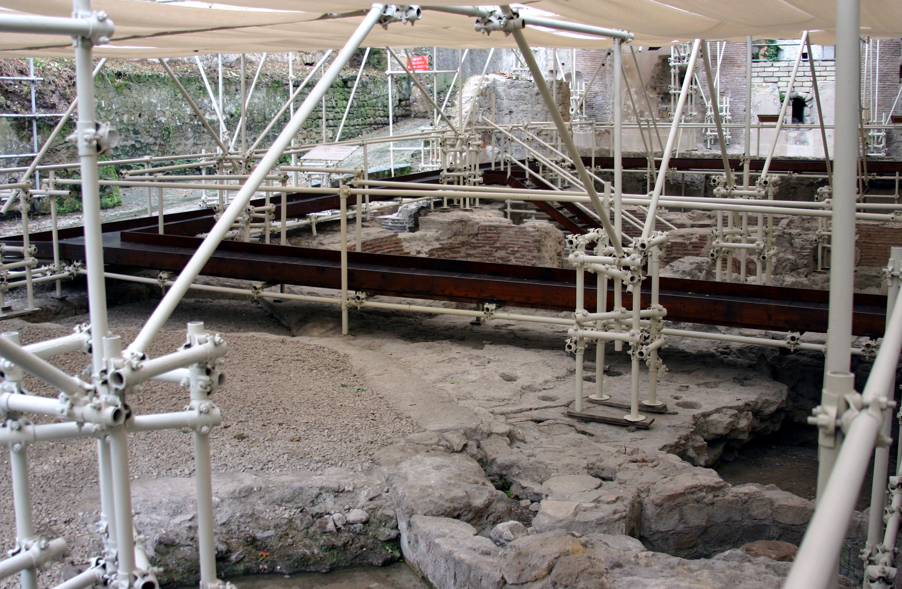 Santa Chiara - Naples